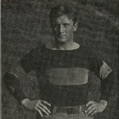 Tennessee Volunteers tackle "Farmer" Kelly